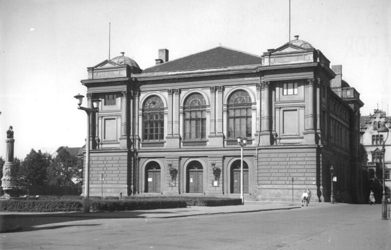 Eisenach, Theater Zentralbild Selle 16.9.1953 Ho. Eisenach: Thüringen: Das Landestheater.